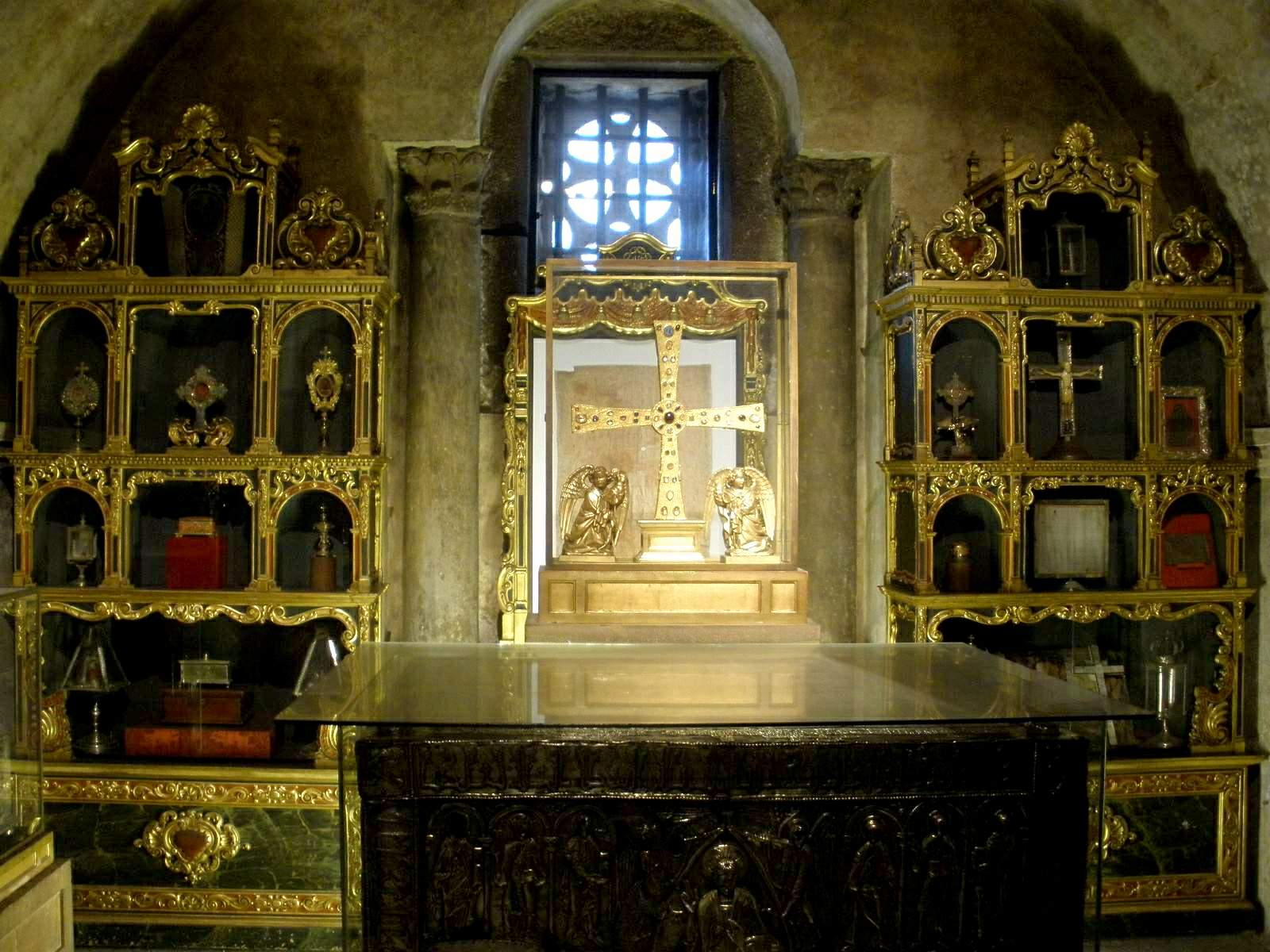 Cámara Santa de Oviedo, (Asturias), en el interior de la catedral de Oviedo. En primer plano aparece el Arca Santa de Oviedo, que fue recubierta enteramente de plata en el siglo XI por disposición del rey Alfonso VI de León.